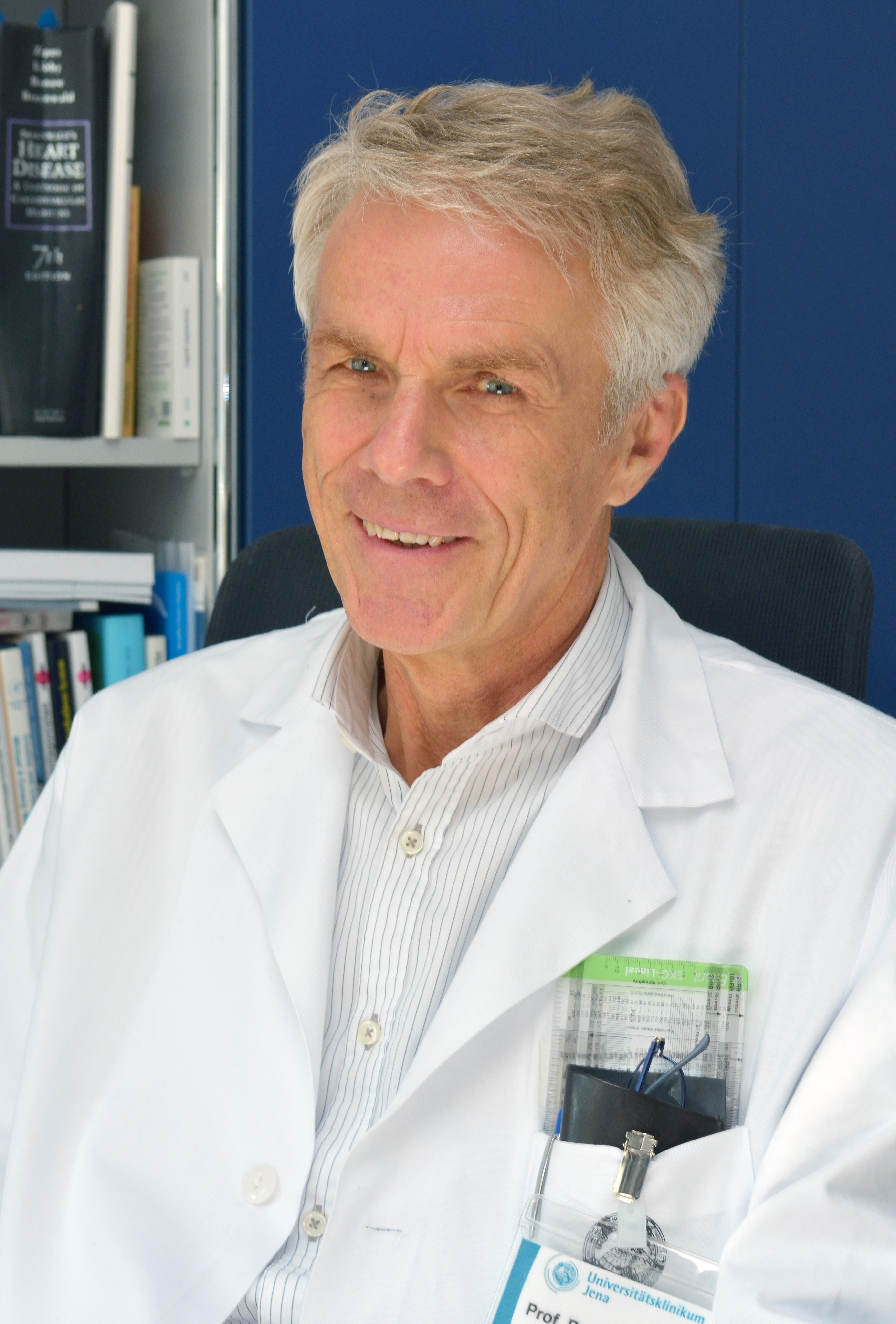 Porträt